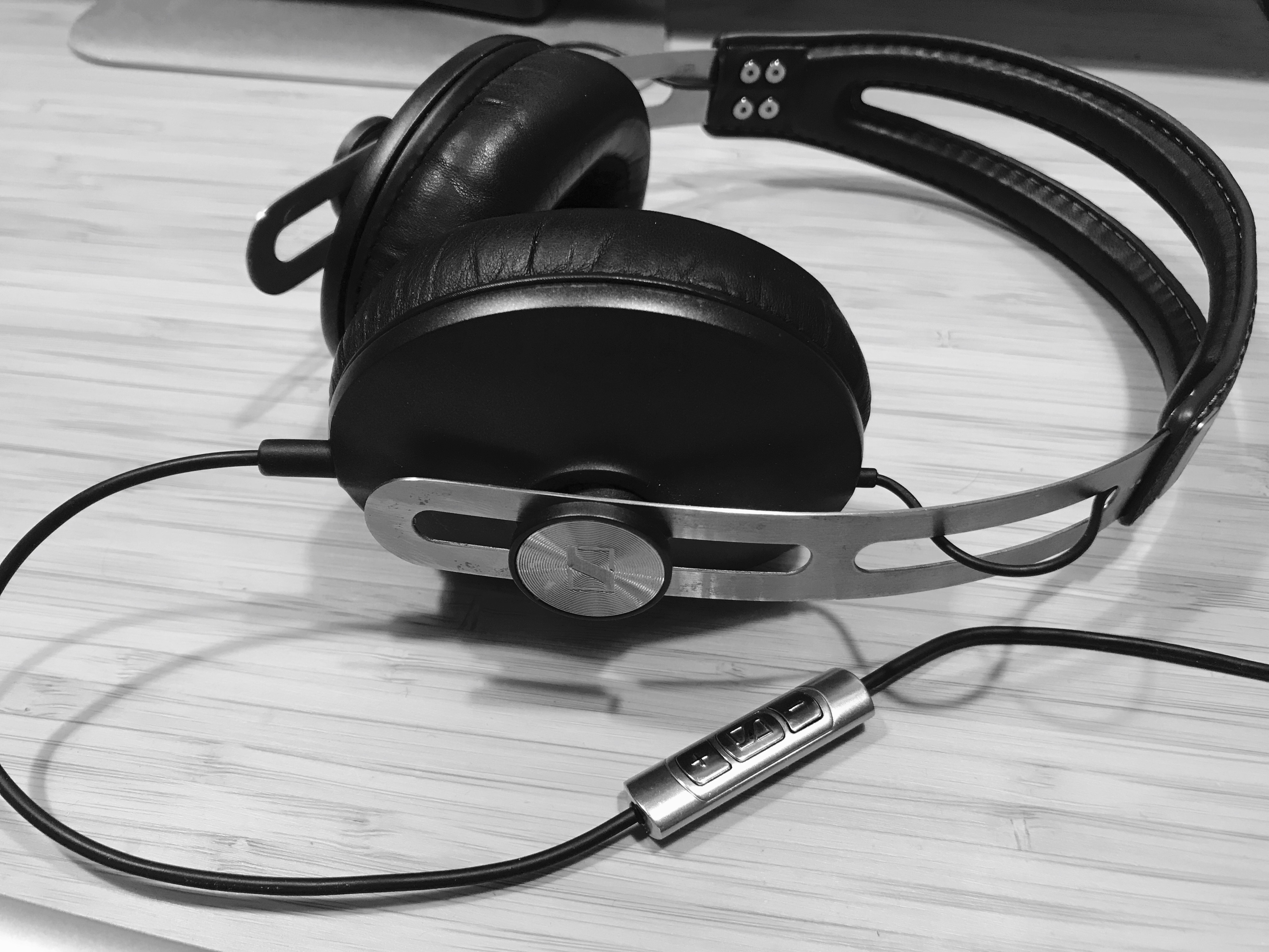 Sennheiser Momentum 1.0 headset